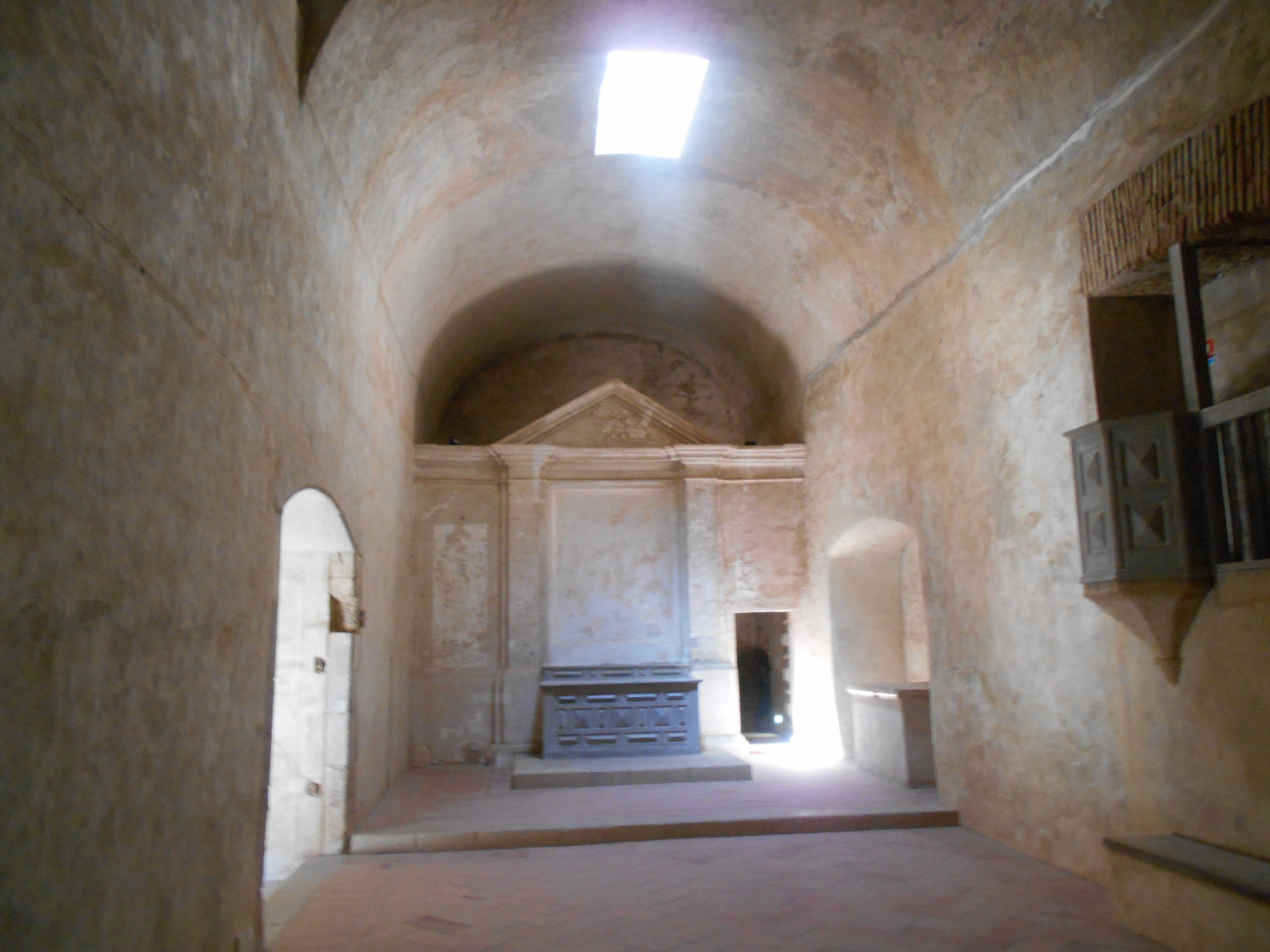 Capella del Castell de Salses